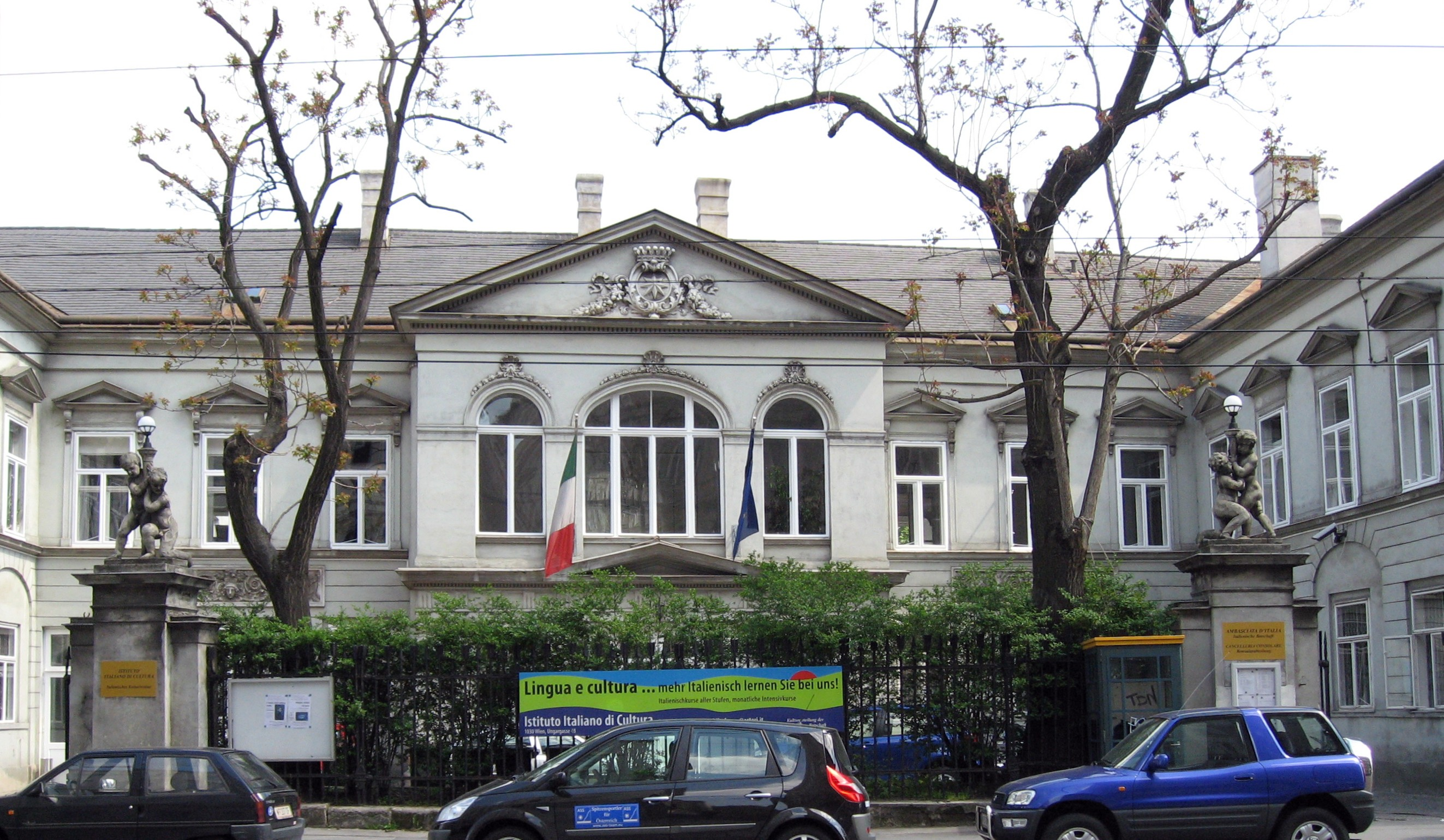 Wien Ungargasse Palais Sternberg